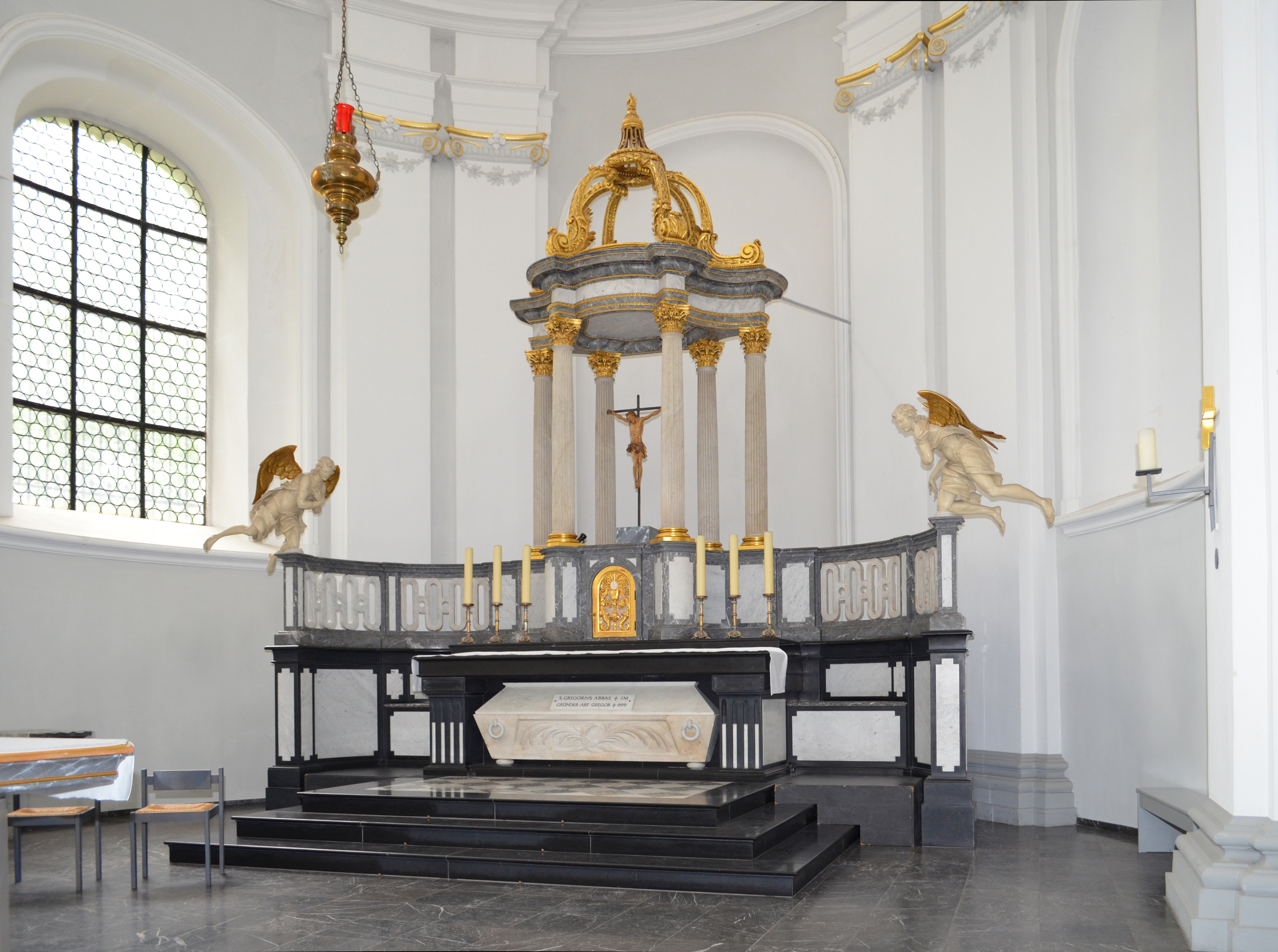 Altar in der Kirche St. Johann Baptist in Aachen-Burtscheid